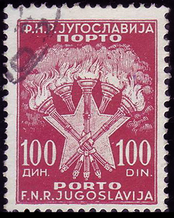 Последняя доплатная марка ФНРЮ